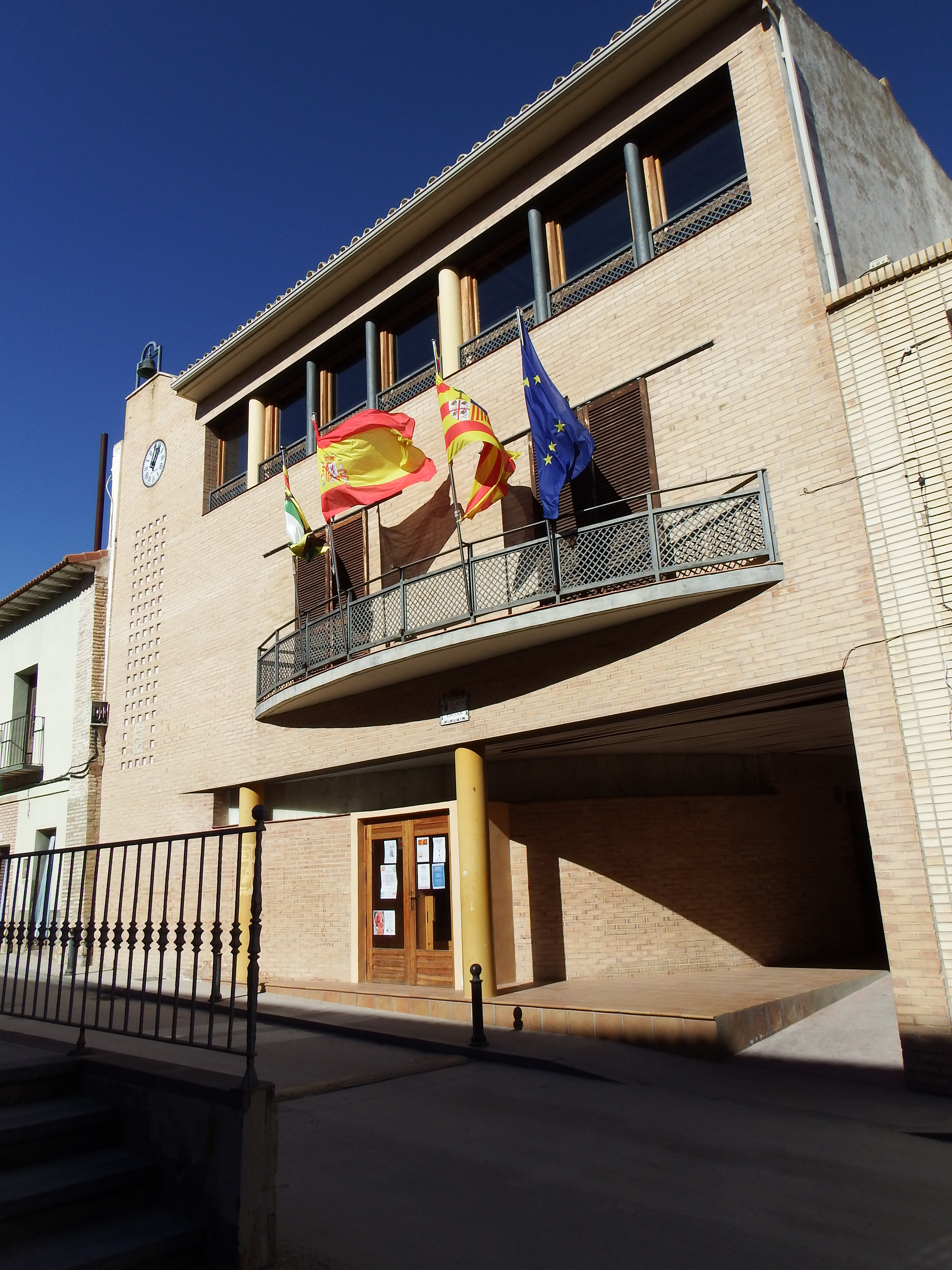 Monegrillo